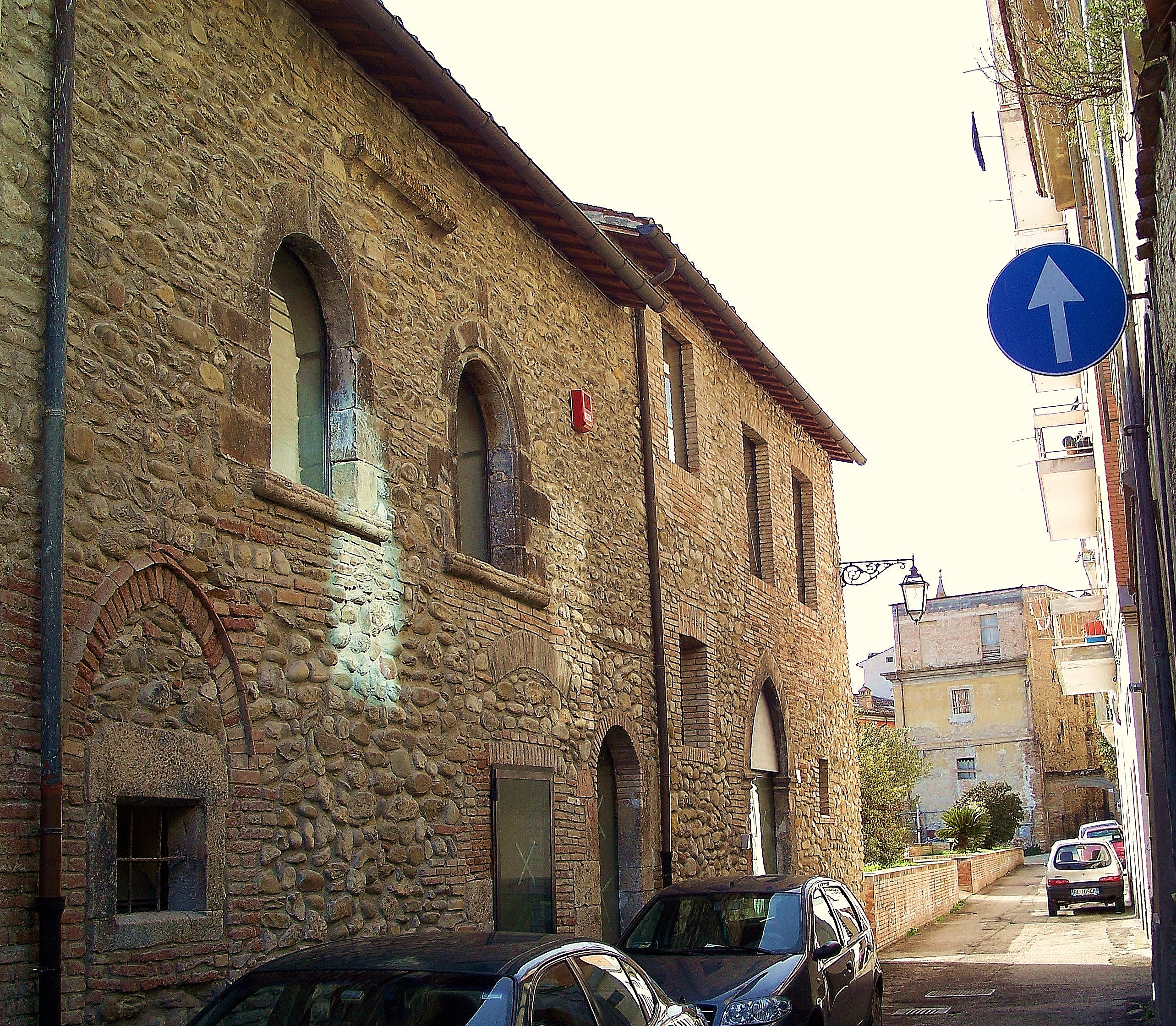 Casa medievale risalente all' XI sec.